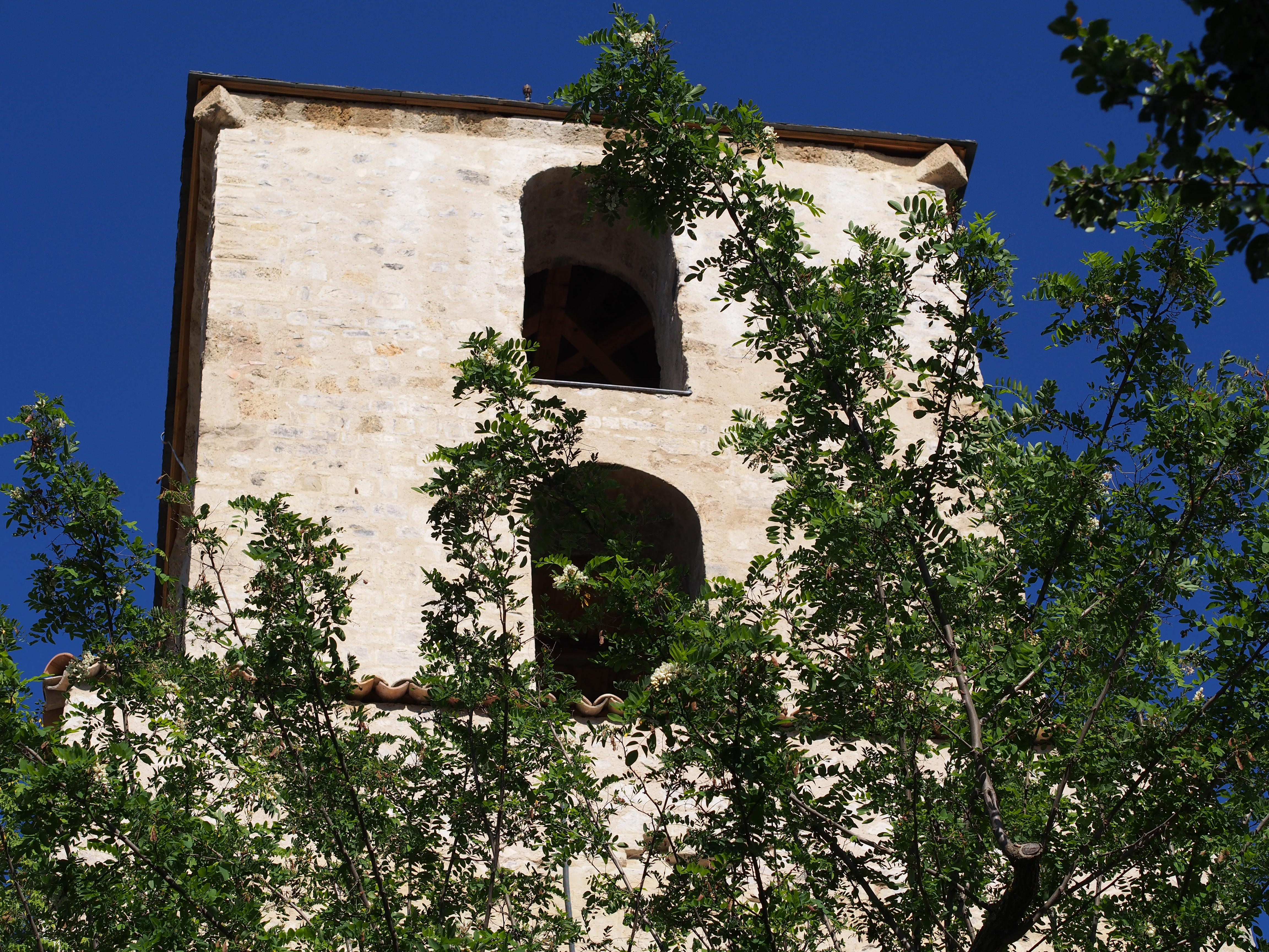 Clocher-donjon (tour de l'ancien donjon) du XIIIe siècle de l'église Notre-Dame-de-Bethléem de Thoard (France). .